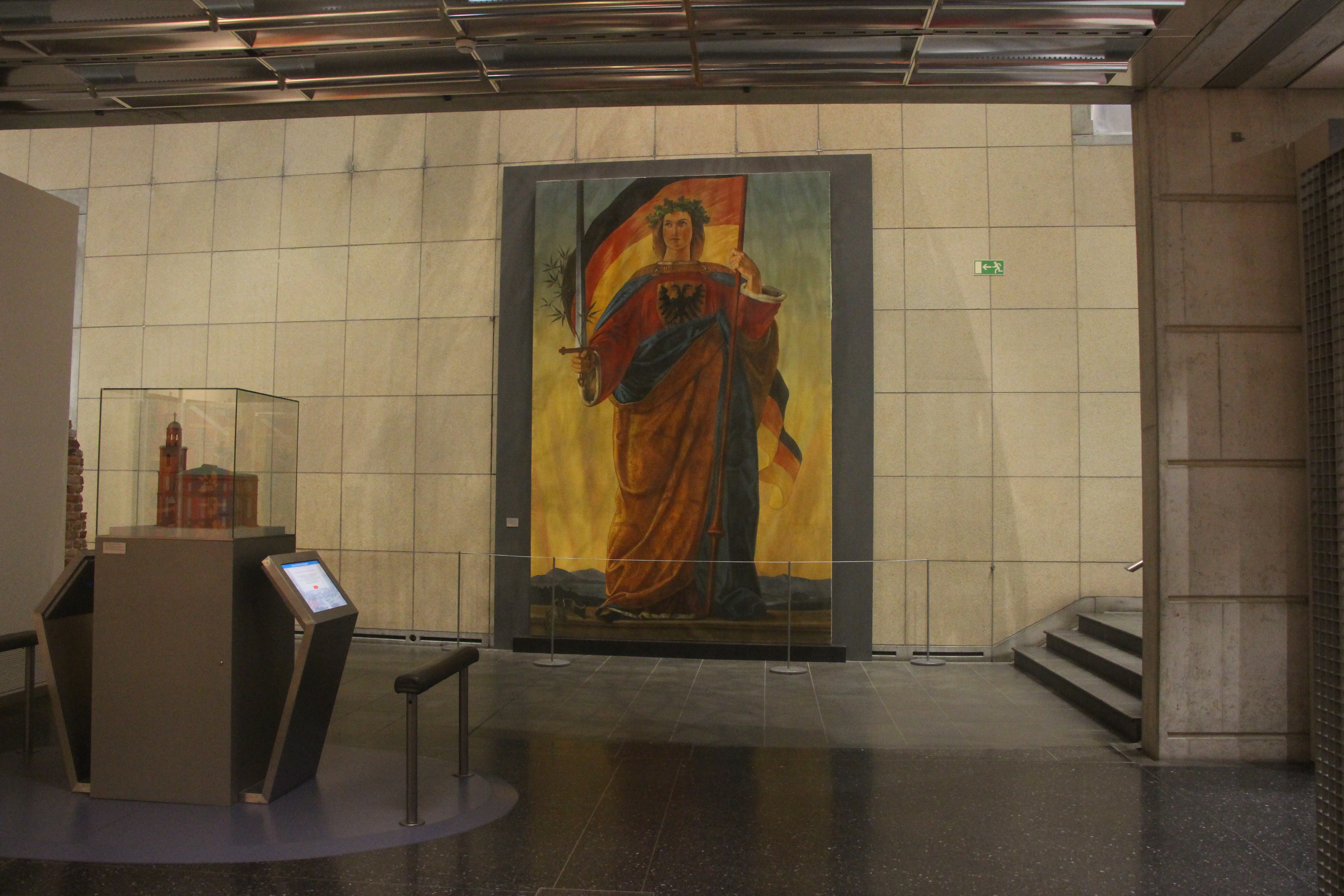 Kopie der "Germania" aus der Paulskirche, sowie (links) Modell der Paulskirche. Haus der Geschichte, Bonn.